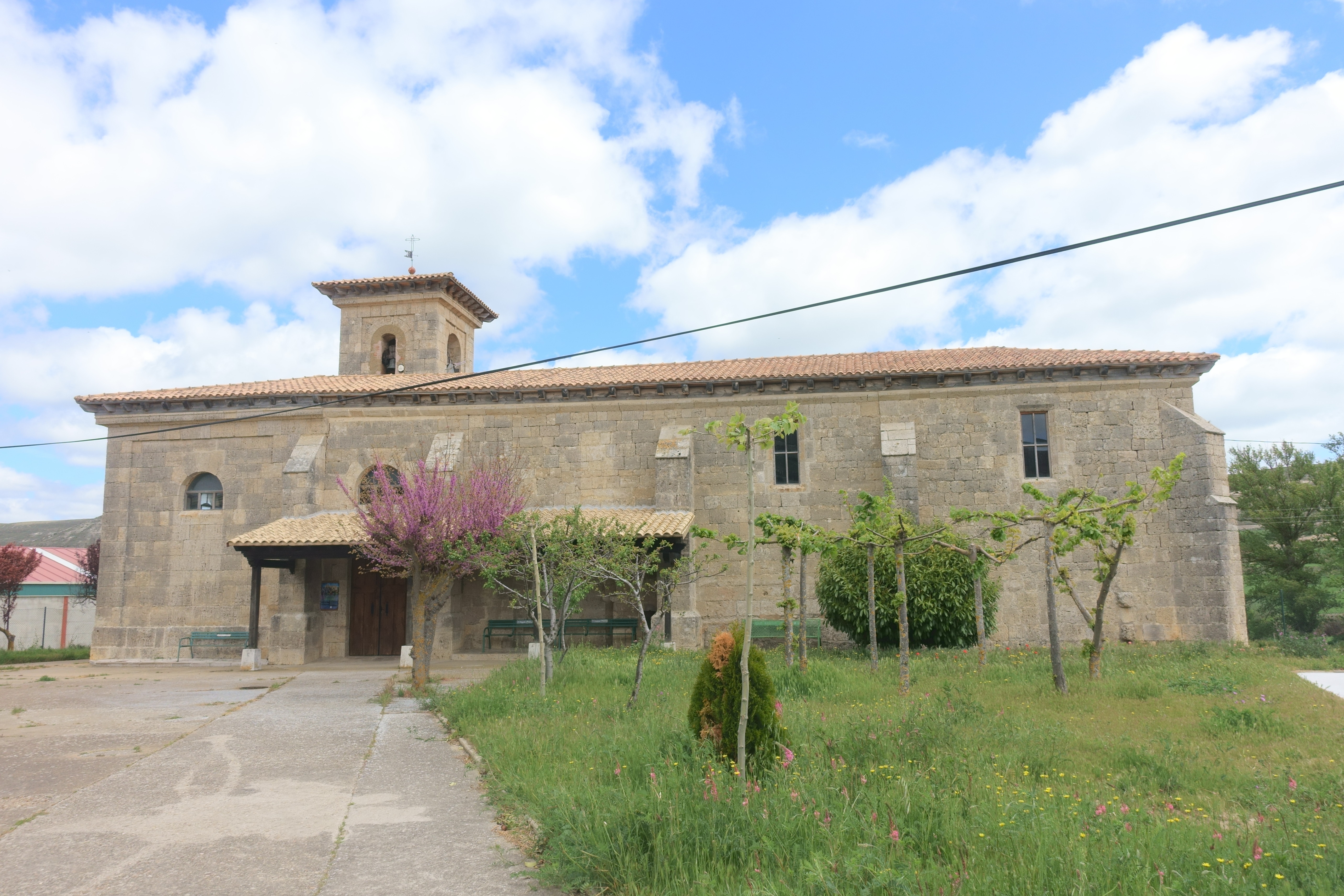 Iglesia de San Miguel, Villaquirán de la Puebla (Burgos, España).